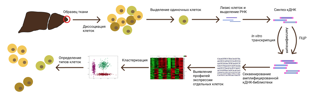 Единичные клетки выделяют из образца ткани. На основе их РНК строится библиотека кДНК, библиотека секвенируется. По результатам секвенирования определяются профили экспрессии клеток, эти данные кластеризуются, и по кластерам выявляются типы клеток, присутствовавшие в исходном образце.